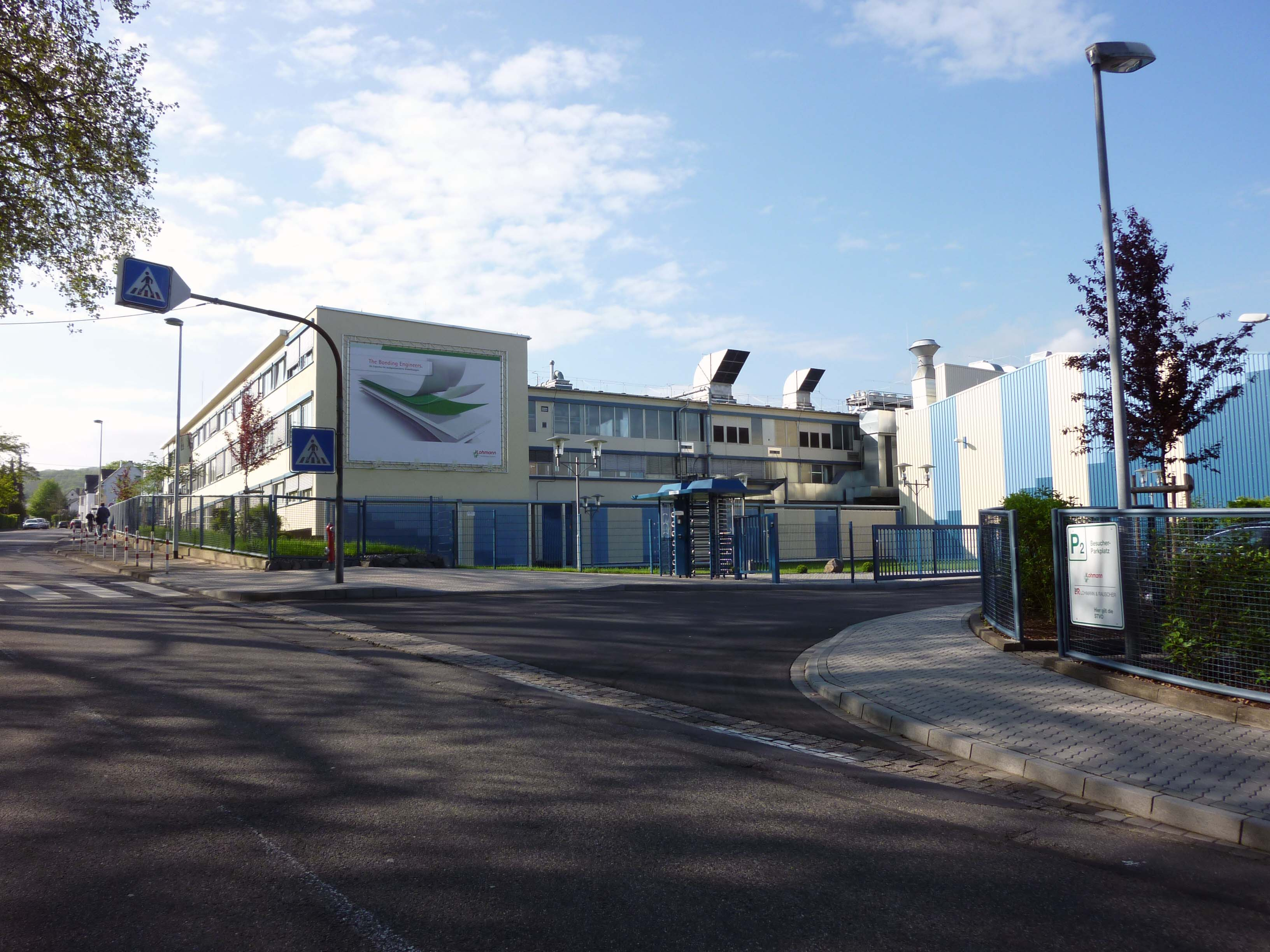 Lohmann Klebetechnik Werk Neuwied-Fahr